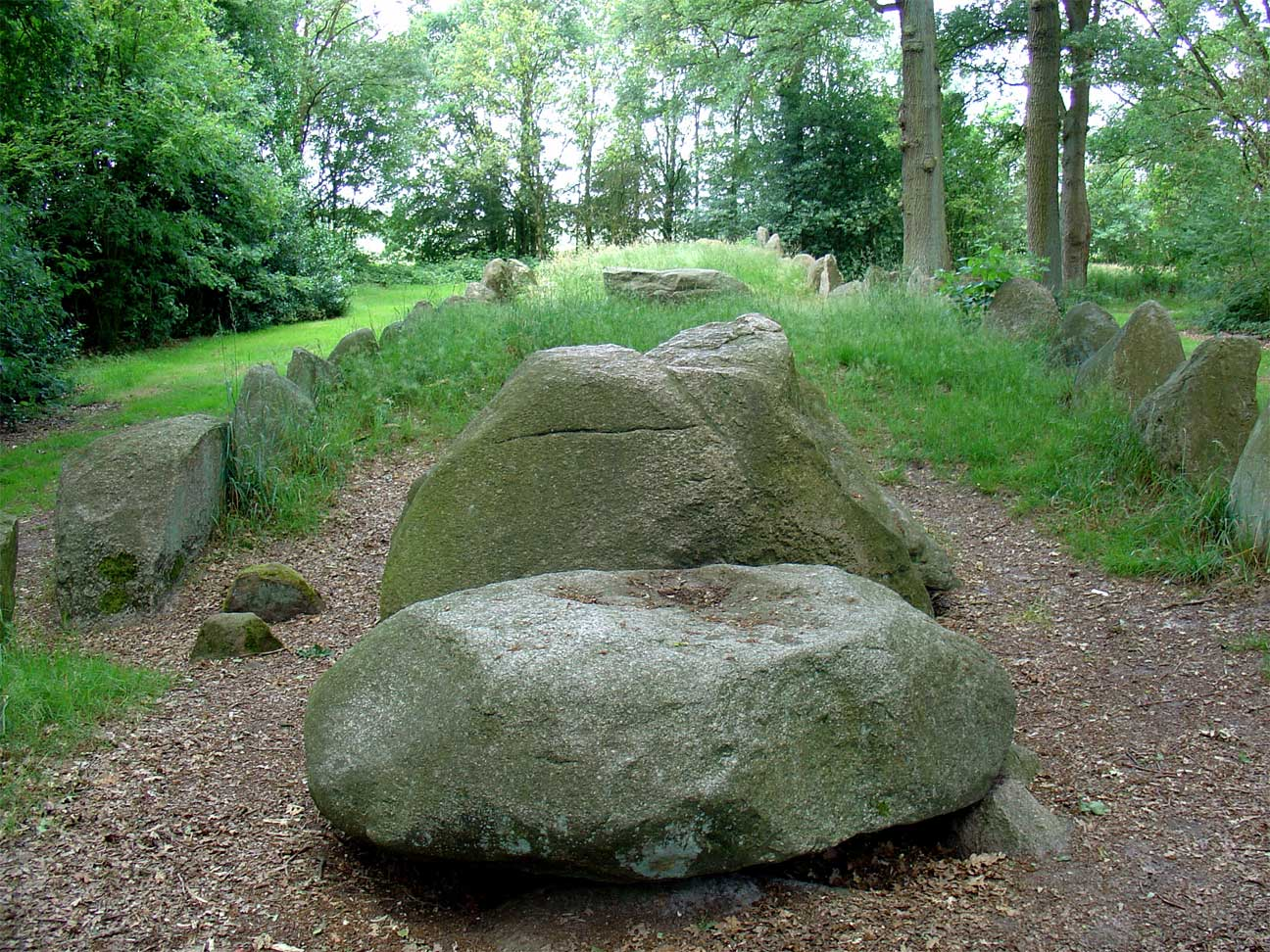 Hunebed D43 (langgraf) op de Emmer esch bij Emmen